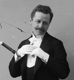 Luigi Rasi